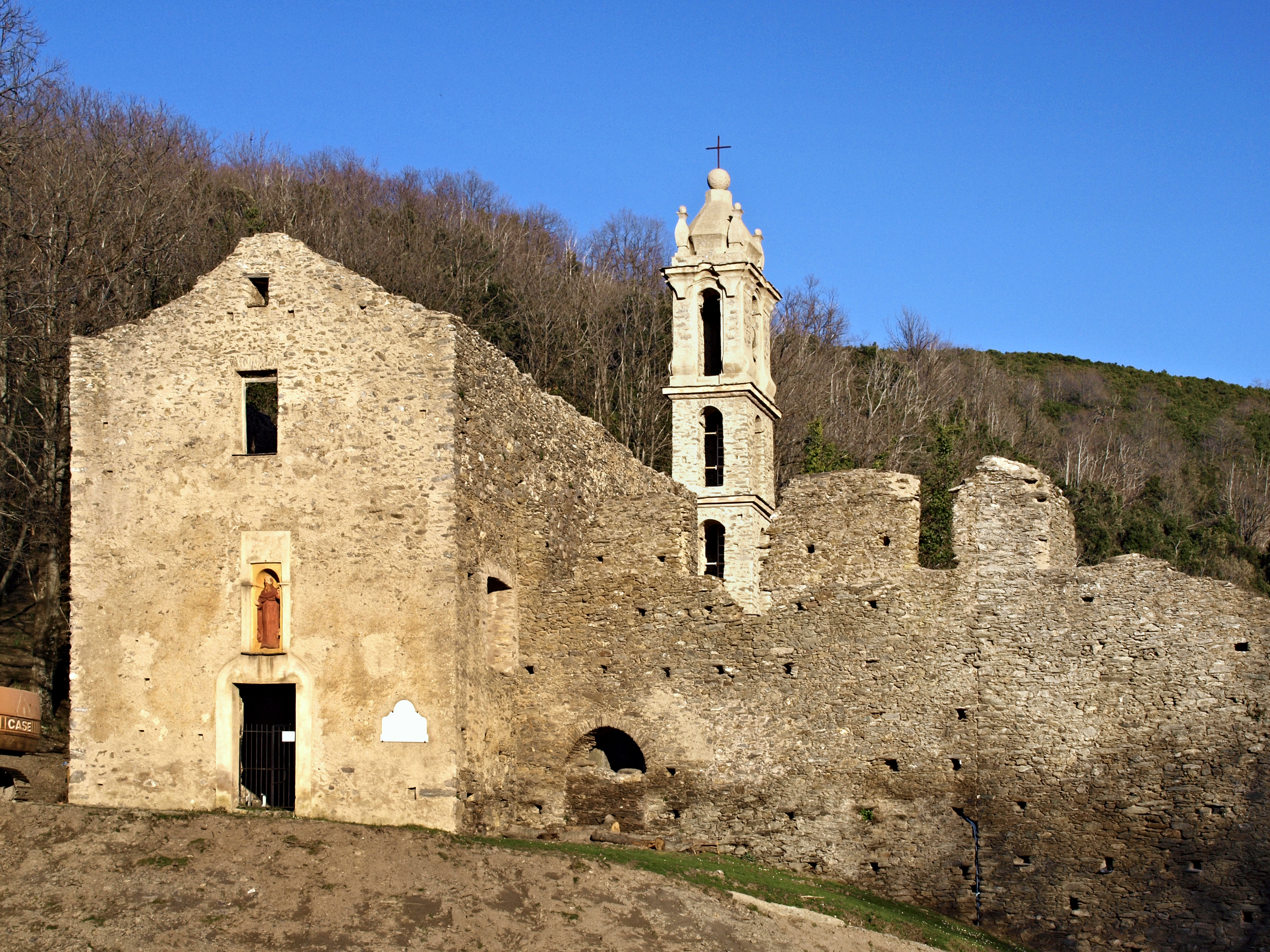 Casabianca, Castagniccia - Le couvent Saint-Antoine (Sant' Antone di A Casabianca), haut lieu historique de la Corse. Le clocher et les ruines du couvent sont inscrits Monument historique .